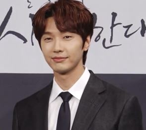 MBC 드라마 '슬플 때 사랑한다' 제작발표회